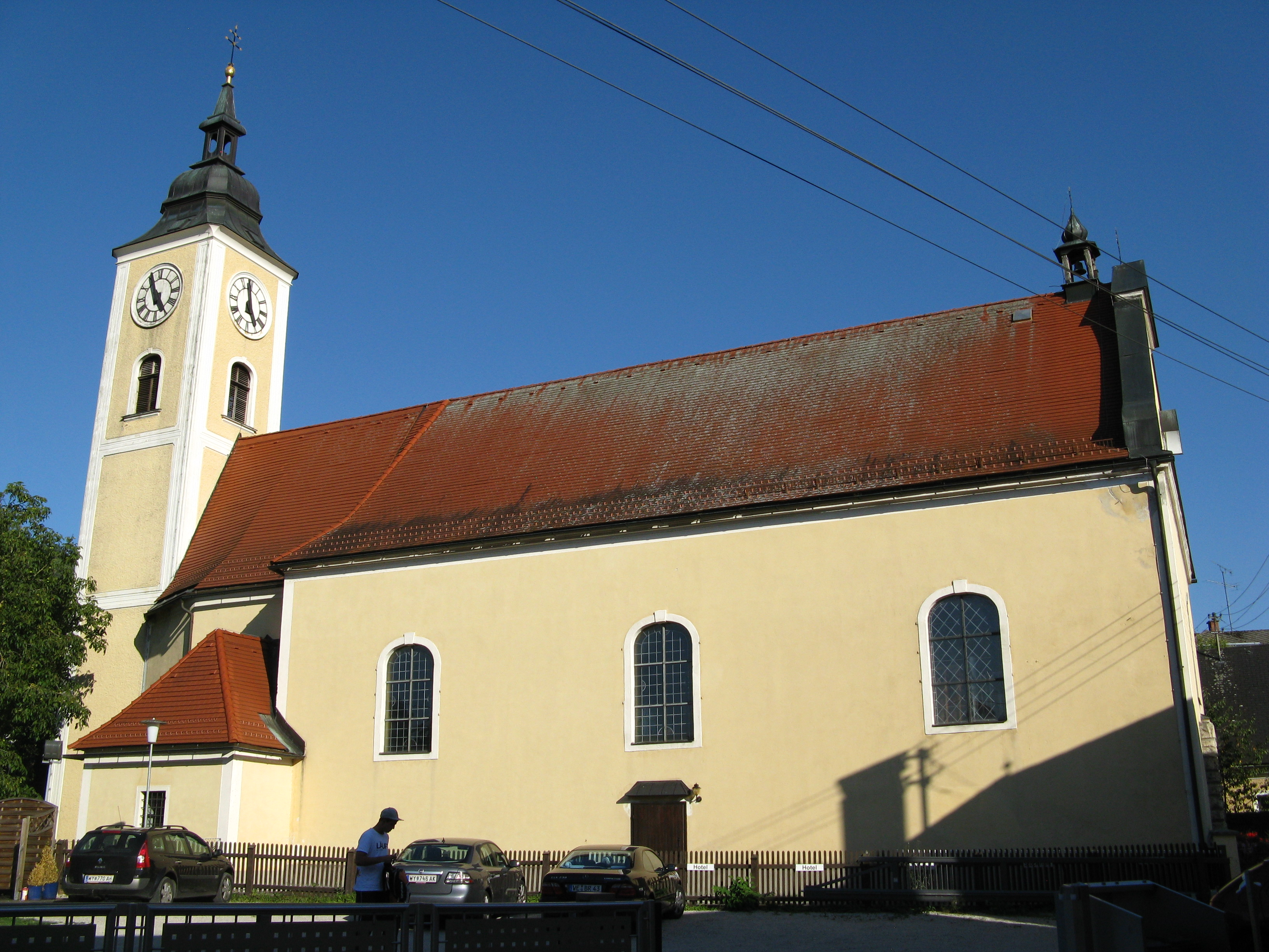 Kath. Pfarrkirche hl. Florian